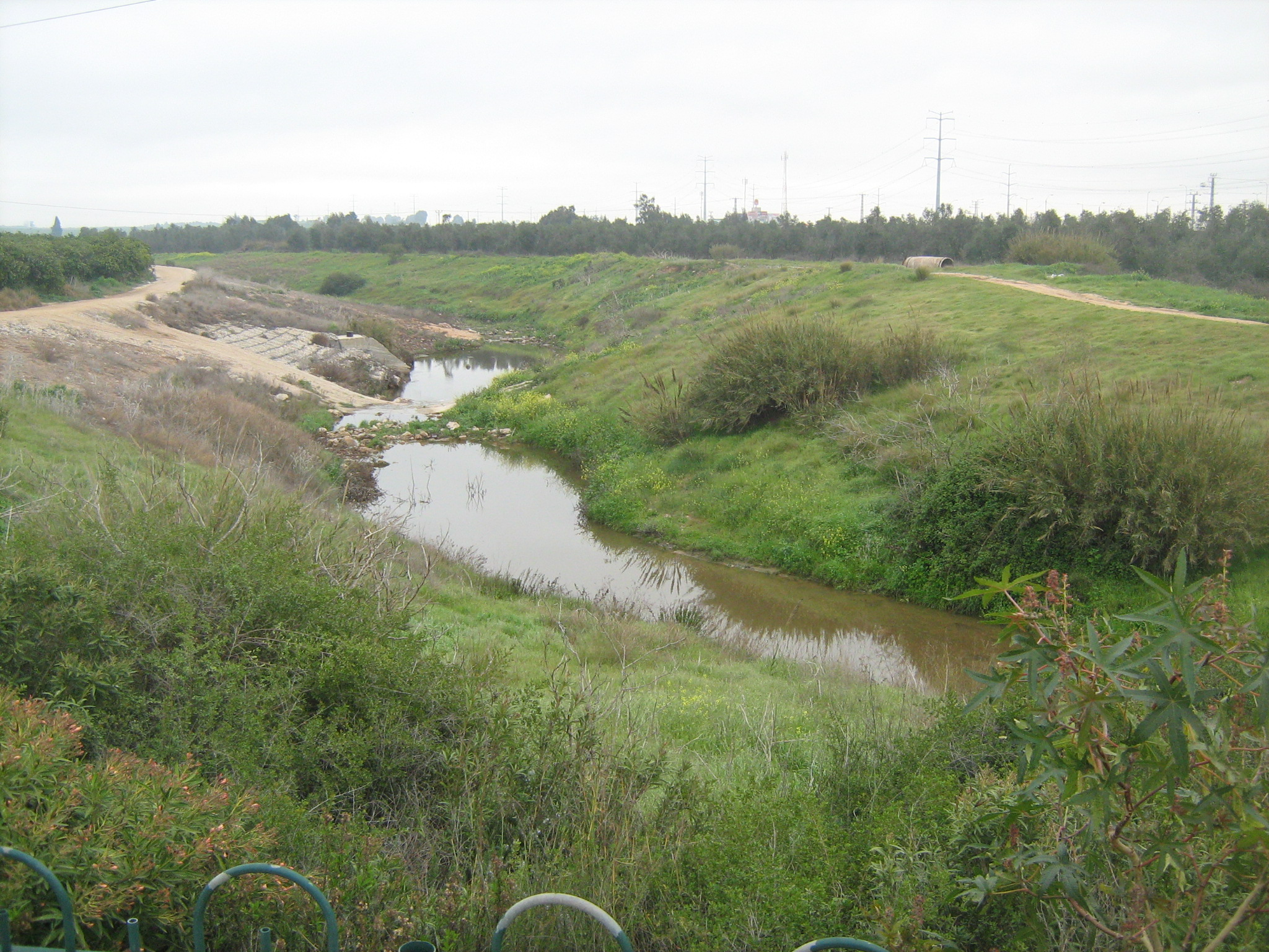 פארק עד הלום